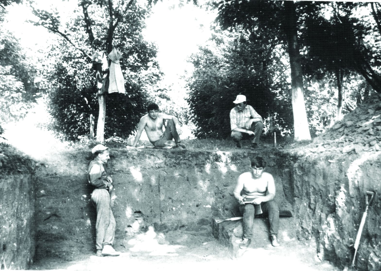 Арматнів: Експедиція в Арматнові. 1988 рік.